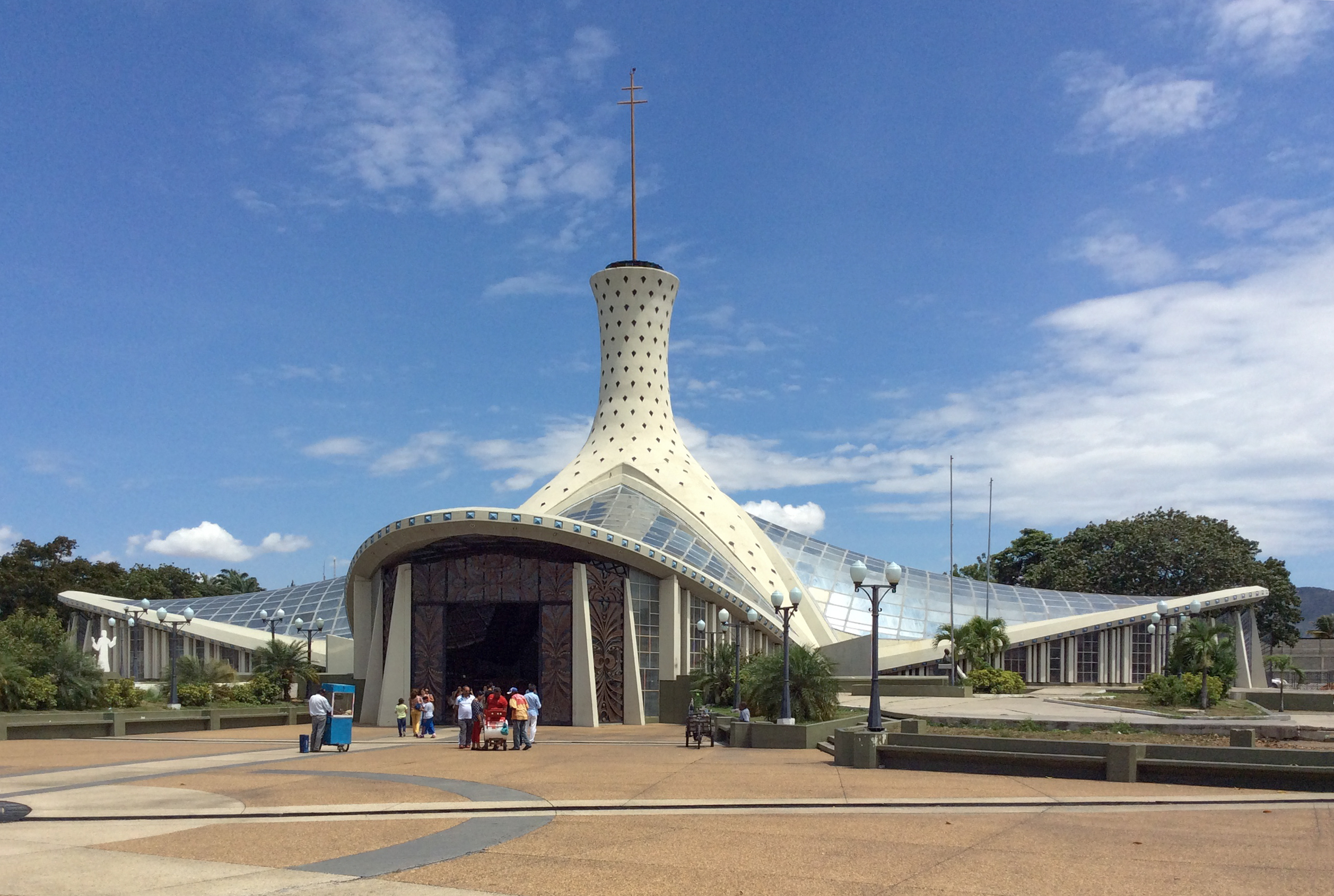 La morfología de la Santa Iglesia Catedral Metropolitana imita la forma de una flor invertida que se posa en el suelo venezolano.